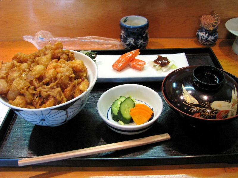 Tendon (tempura domburi)